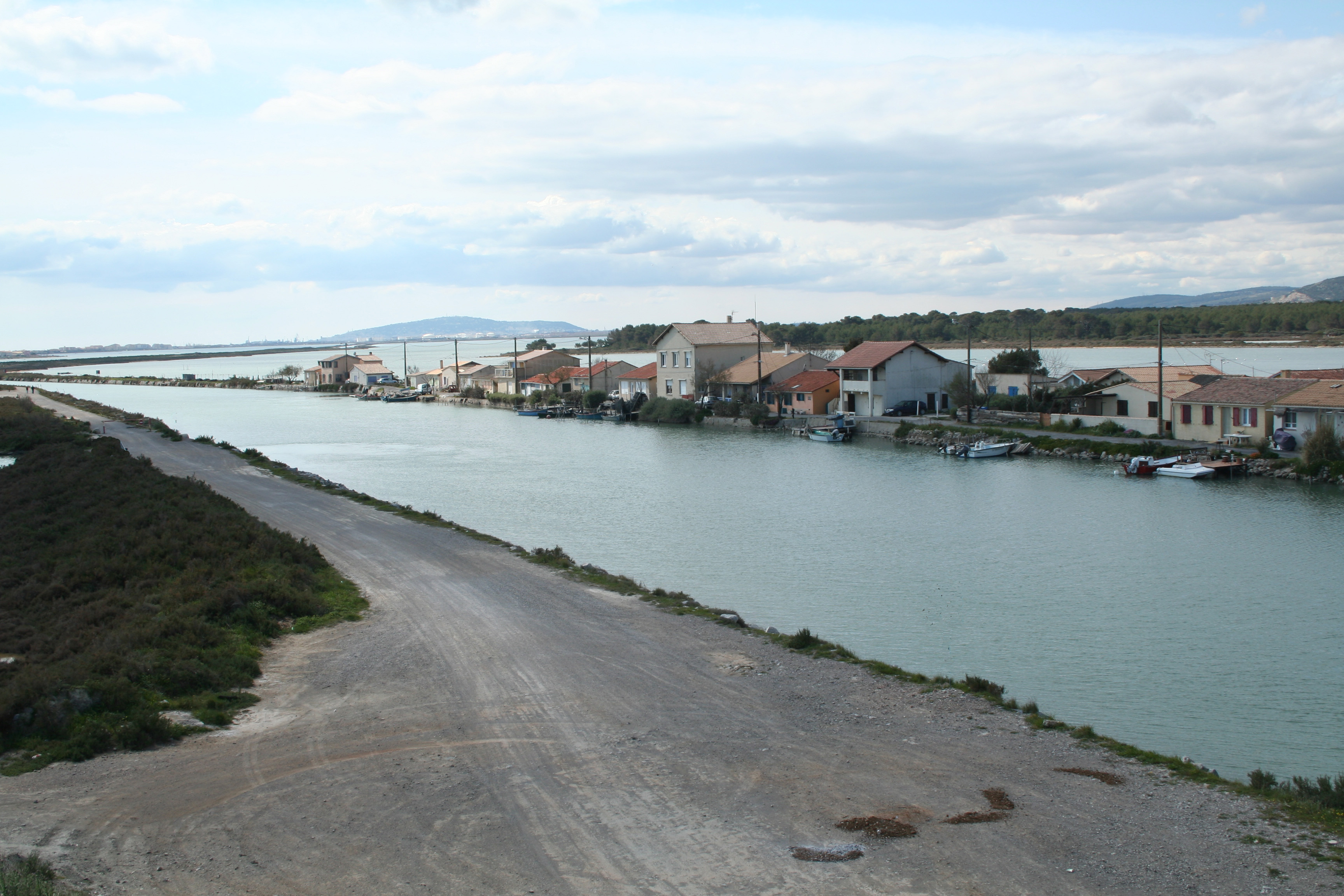 Vic-la-Gardiole (Hérault) - les Aresquiers, le canal du Rhône à Sète, les étangs. Le Canal du Rhône à Sète aux Aresquiers, entre deux étangs, à la hauteur de Vic-la-Gardiole). À l'horizon, Sète.